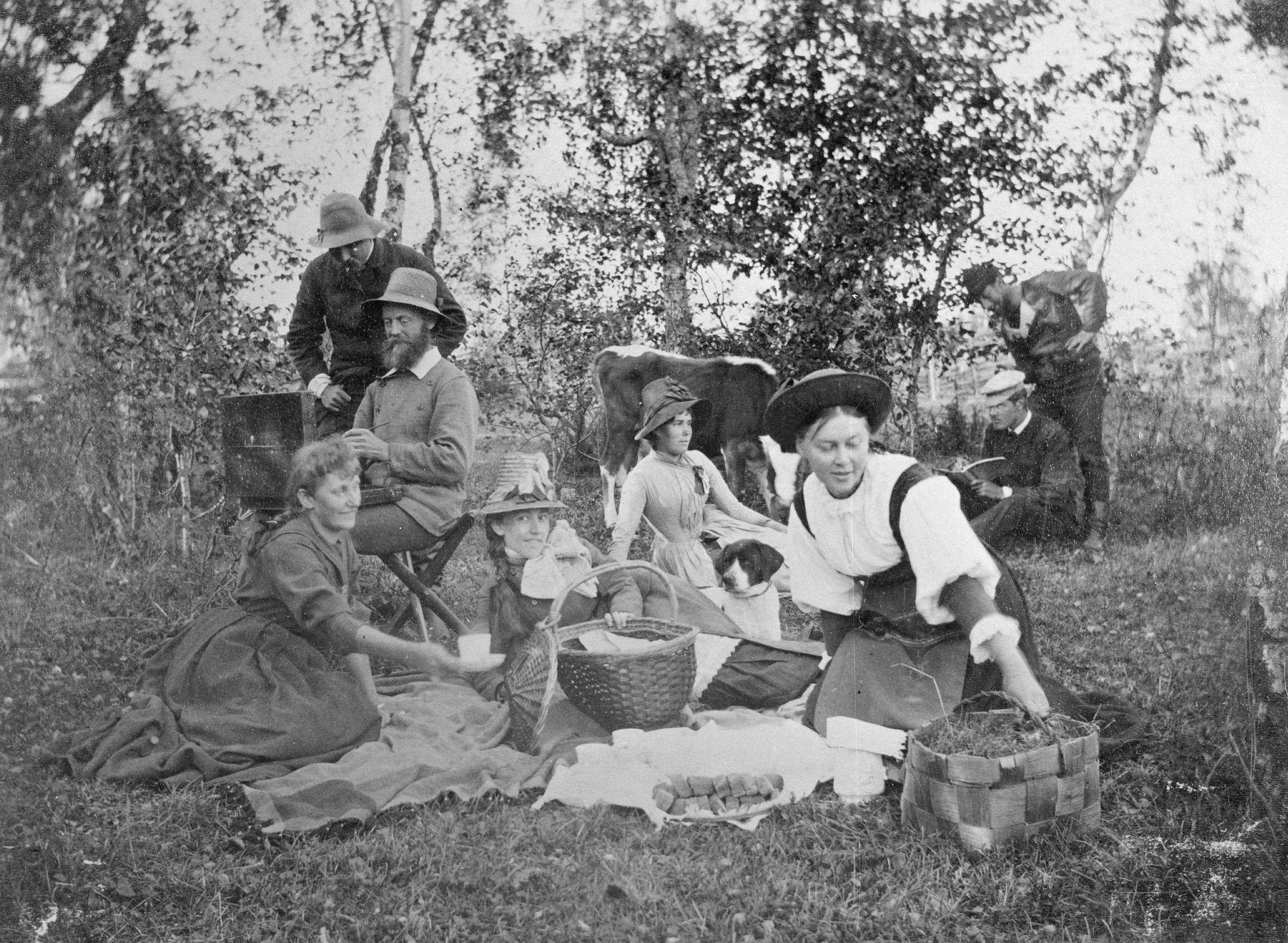 Nurmikolla istumassa vasemmalta: Hanna Rönnberg, Hilma Westerholm, Elin Danielson ja Nina Ahlstedt. Naisten takana vas. istumassa tuolilla Fredrik Ahlstedt ja seisomassa hänen vierellään Victor Westerholm. Oik. takana maassa Alex Federley ja seisomassa Acke Andersson (J.A.G. Acke).